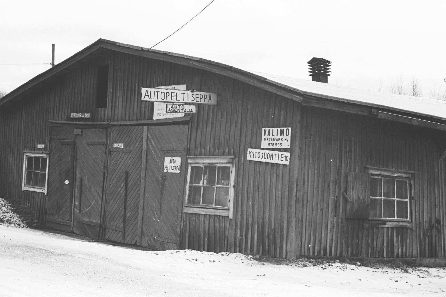 Pikku-Huopalahtea marraskuussa 1970